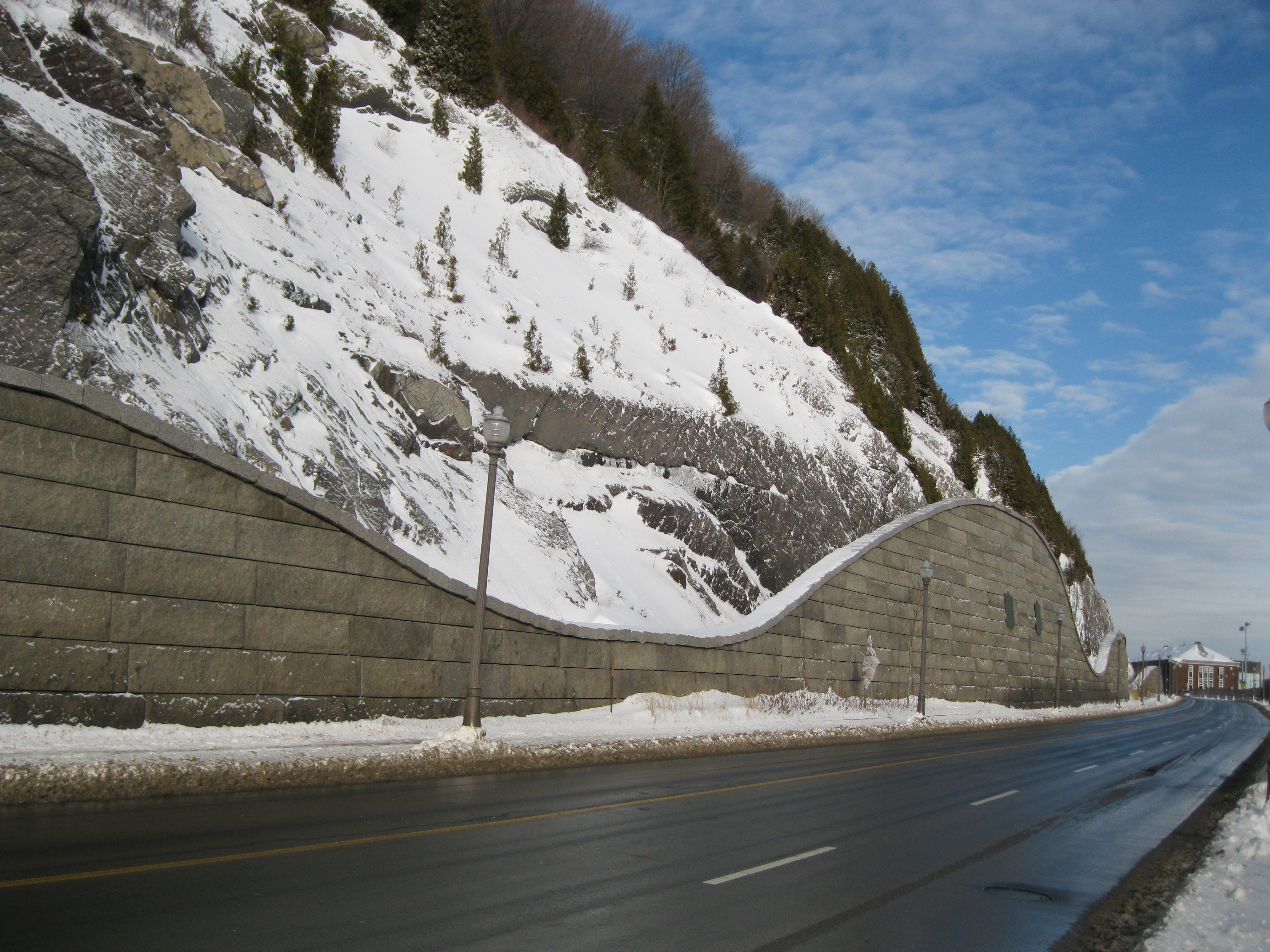 Cap Diamant, Près-de-Ville, Vieux-Québec